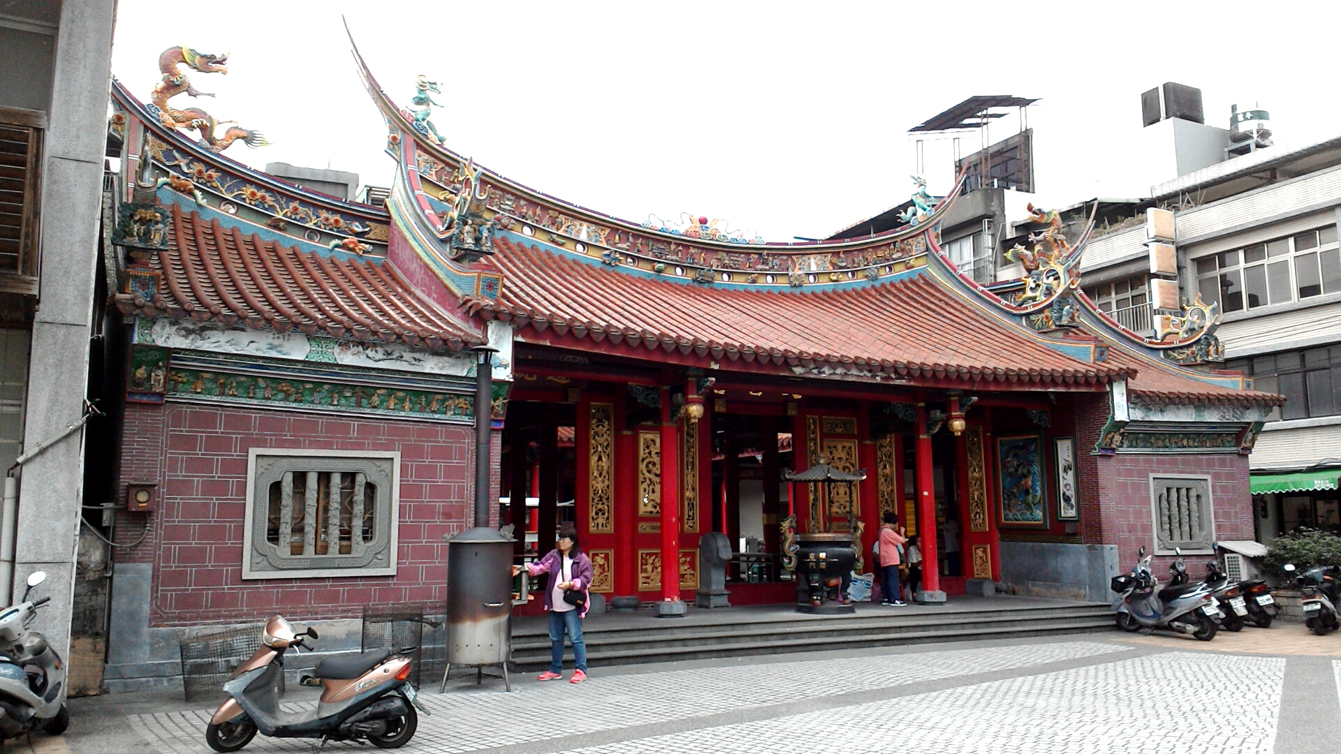 桃園文昌宮,桃園市桃園區市中次分區文昌里